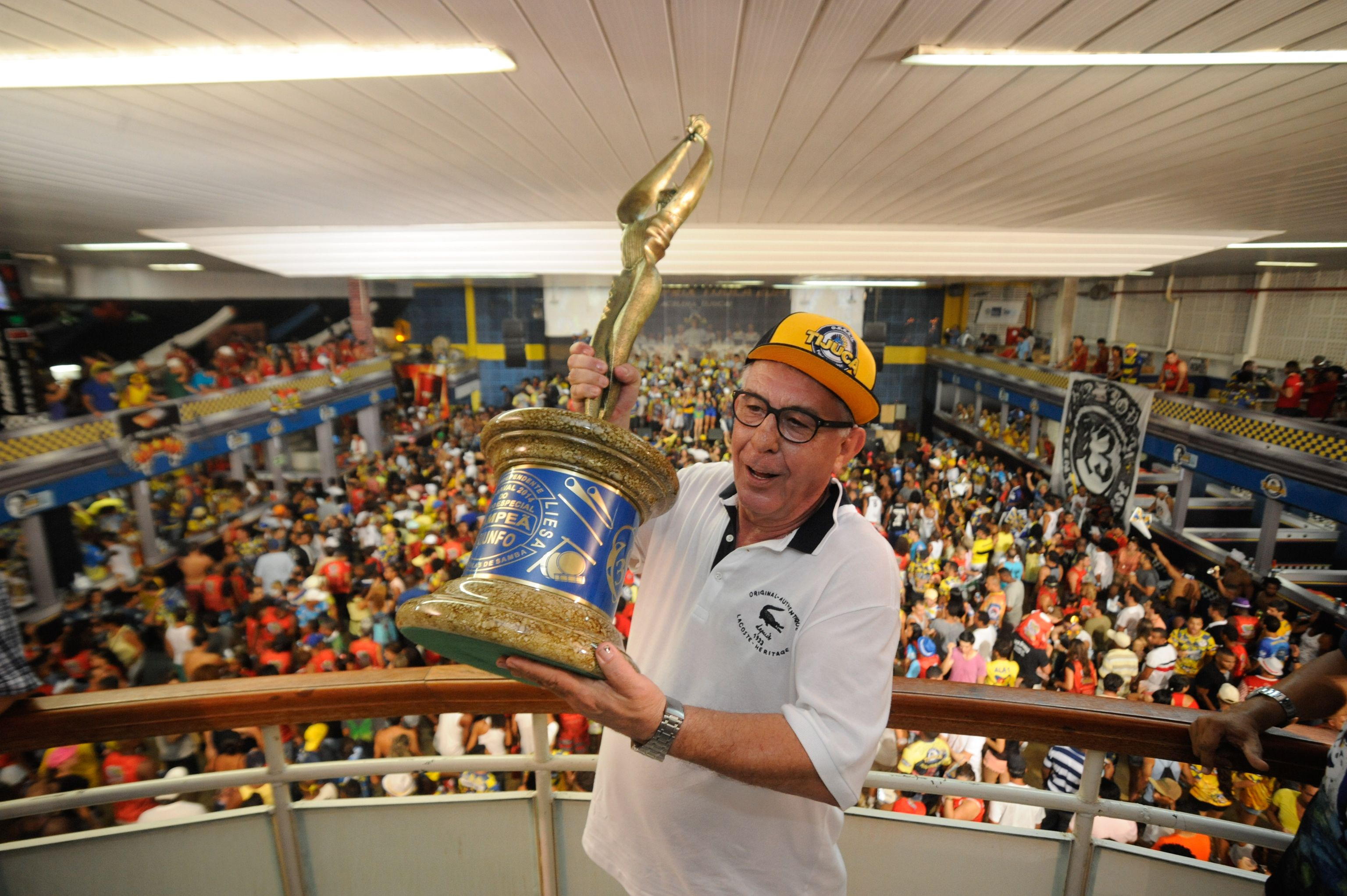 Rio de Janeiro - Comunidade lota a quadra da Unidos da Tijuca para comemorar título de vencedora do carnaval 2014 (Fernando Frazão/Agência Brasil)